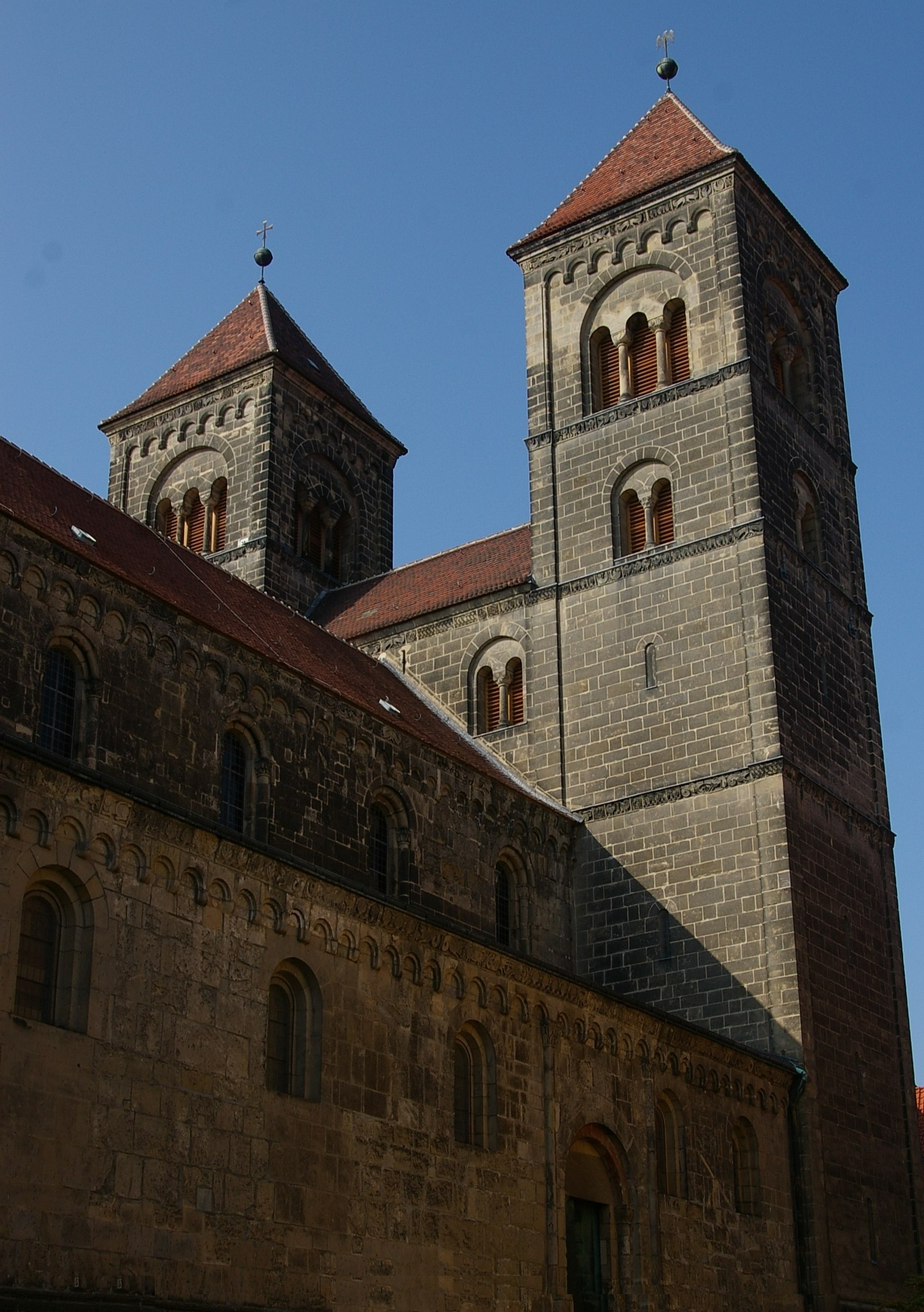 Quedlinburg - Stiftskirche